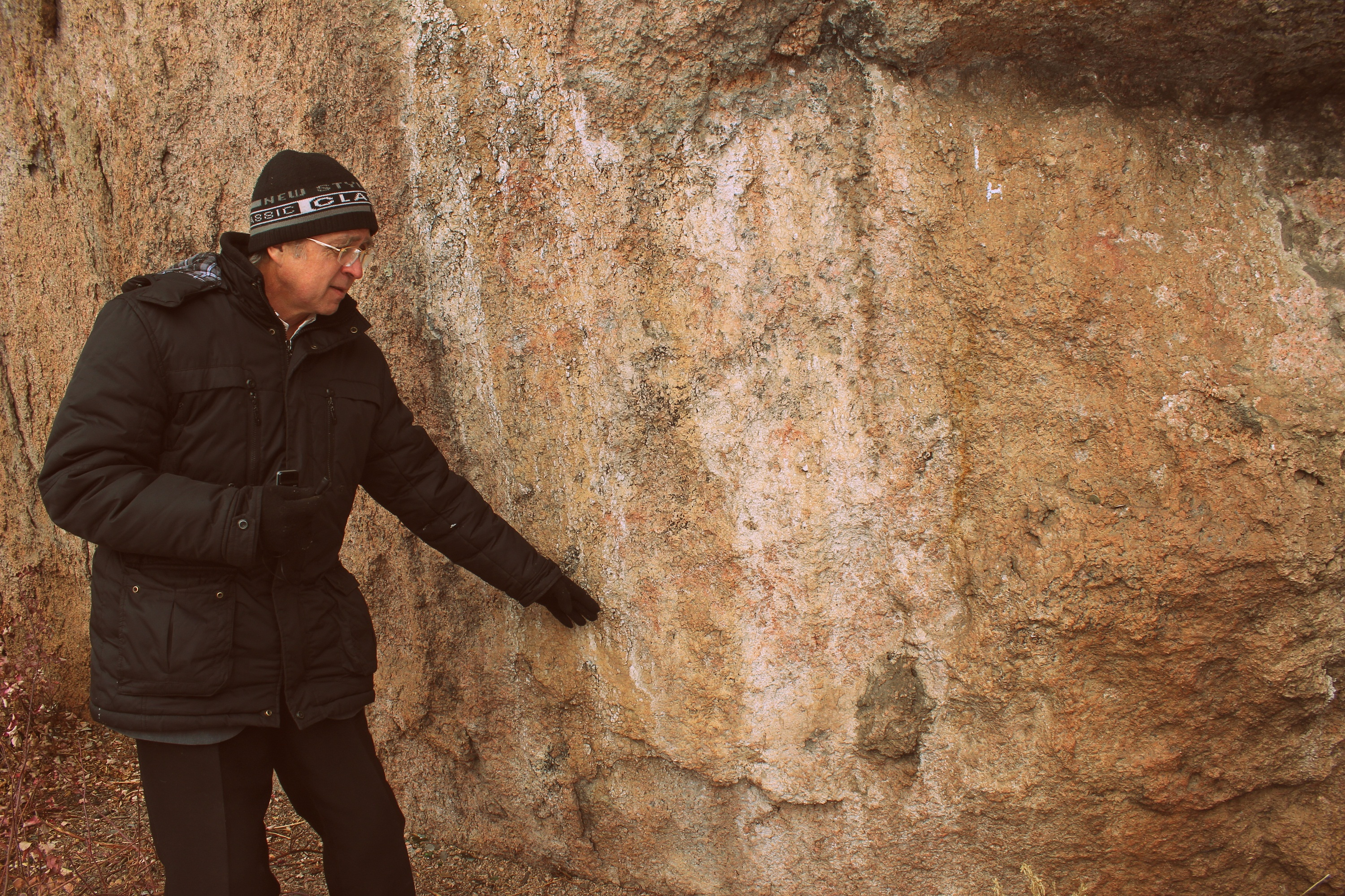 Краевед Сергей Ольхин проводит археологическую экскурсию у горы Шаманка. Новая Брянь, Заиграевский район, Бурятия, Сибирь